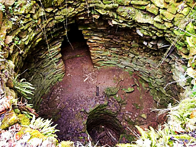 Храм-кладнецът (поглед отгоре)